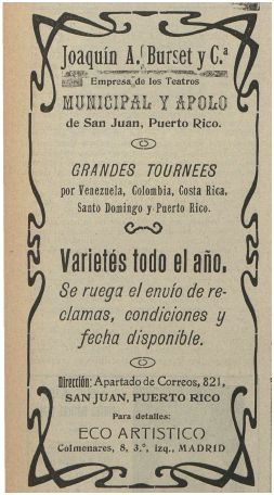 Anuncio de la compañía Burset publicado en Eco Artístico en 1913.